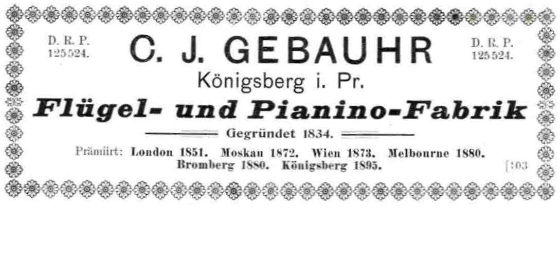 Annonce der Klavierfakrik Gebauhr, Königsberg i. Pr.